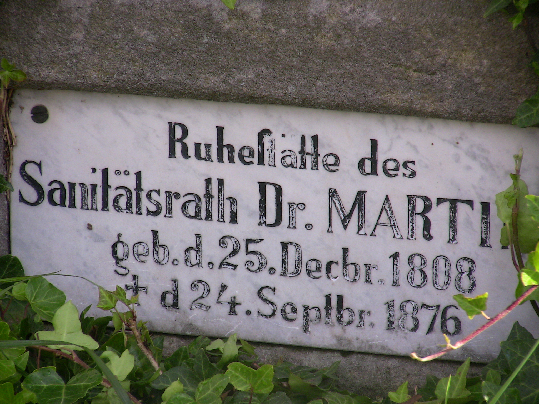 Grabstein des Sanitätsrats Eduard Martiny (1808-1876), Bad Salzschlirf